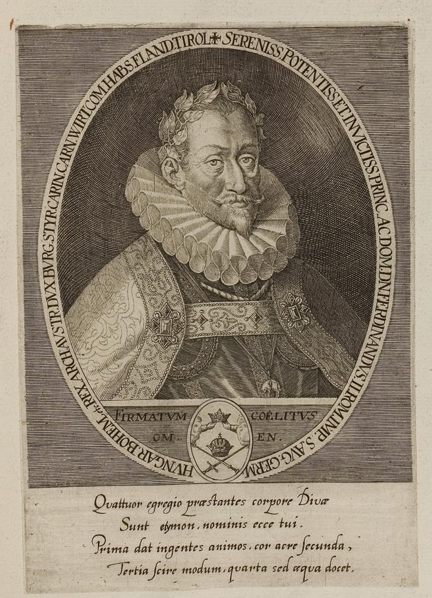 Grafik aus dem Klebeband Nr. 1 der Fürstlich Waldeckschen Hofbibliothek Arolsen Motiv: Kaiser Ferdinand II.